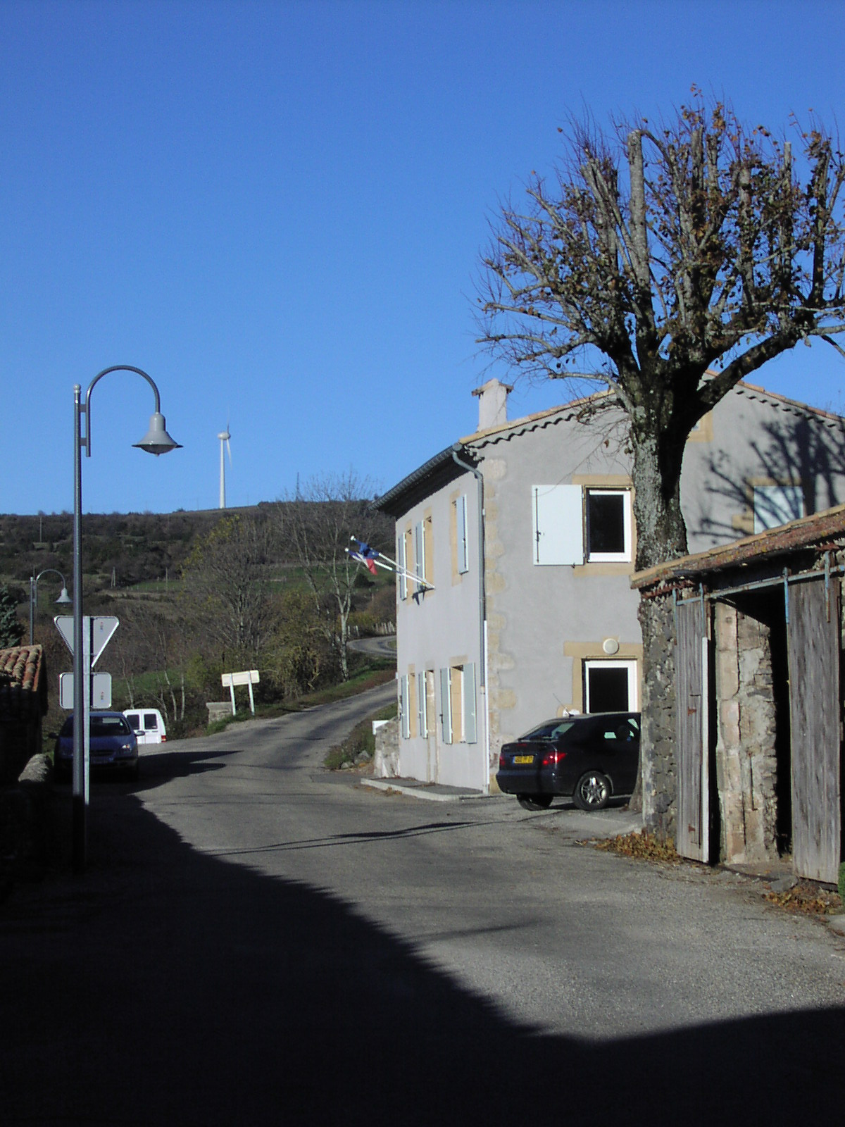 Freyssenet, le village de jour en direction du col de l'Escrinet avec l'ancienne école à droite.